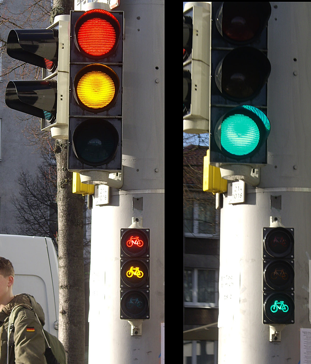 Autoampel und Baby-Fahrradampel, Kassel, Wilhelmshöher Allee/Pestalozzistraße, 01.02.2014. Fotos: Francisco Welter-Schultes.